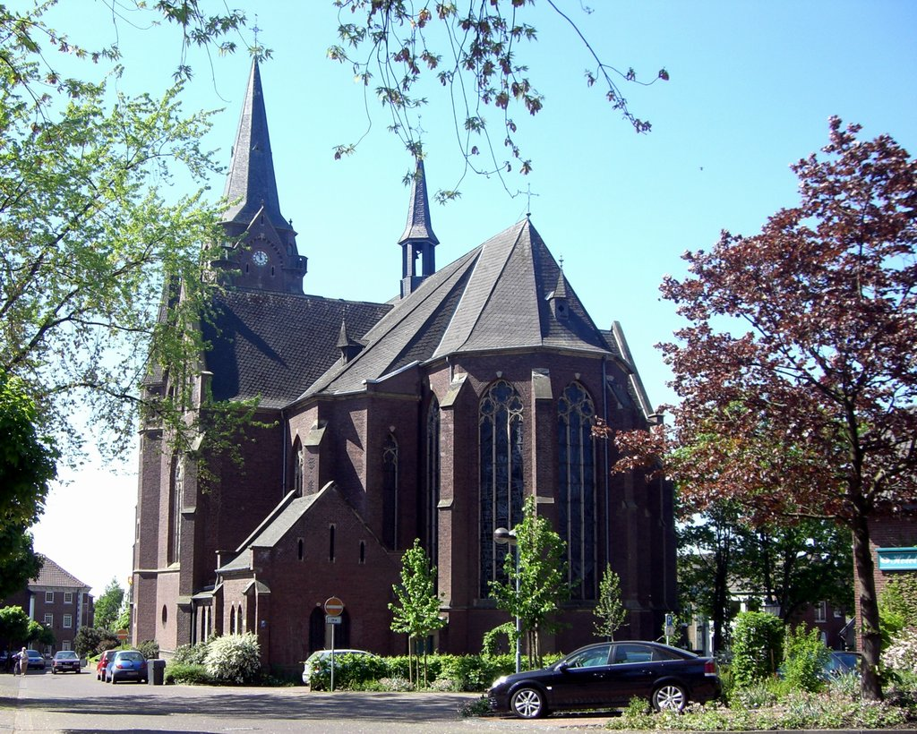 Kirche St. Peter in Hinsbeck. Selbst fotografiert.